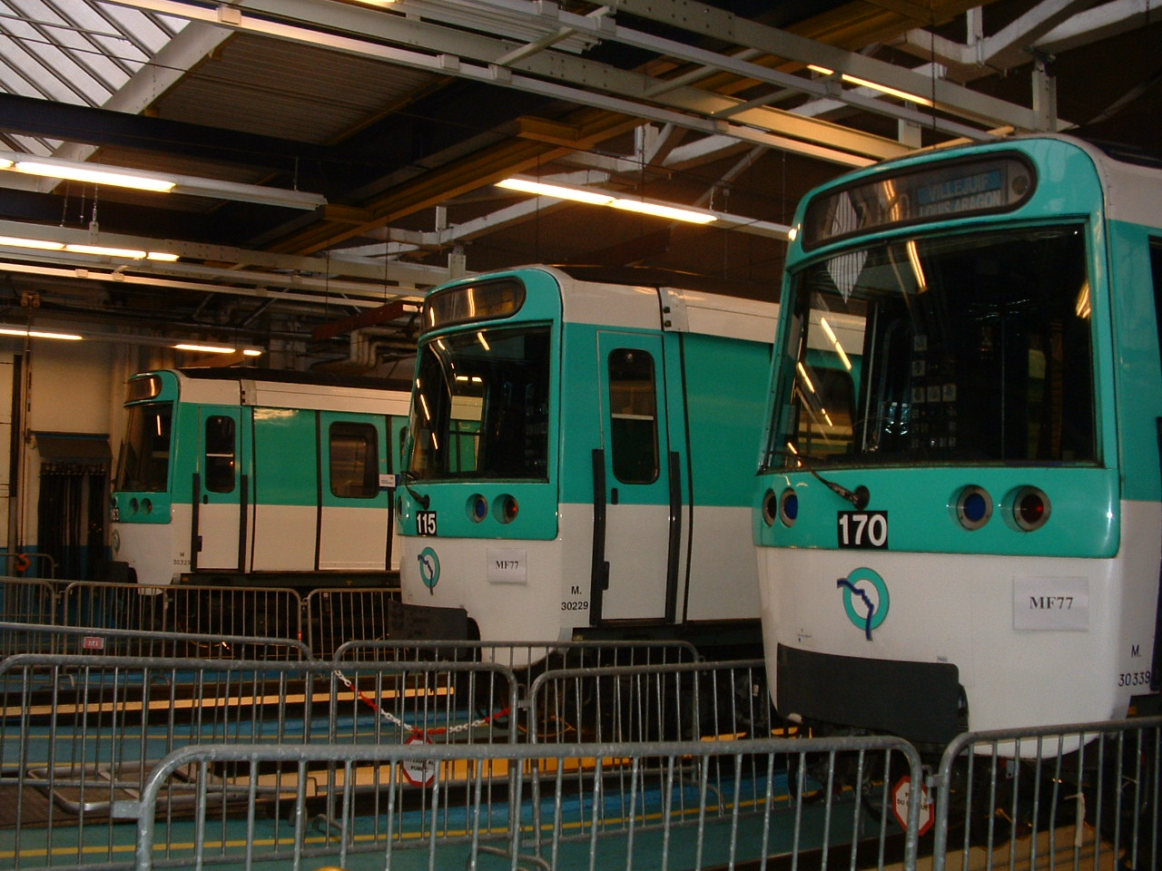 Trains MF 77 alignés sur fosses de visite aux ateliers de Choisy.